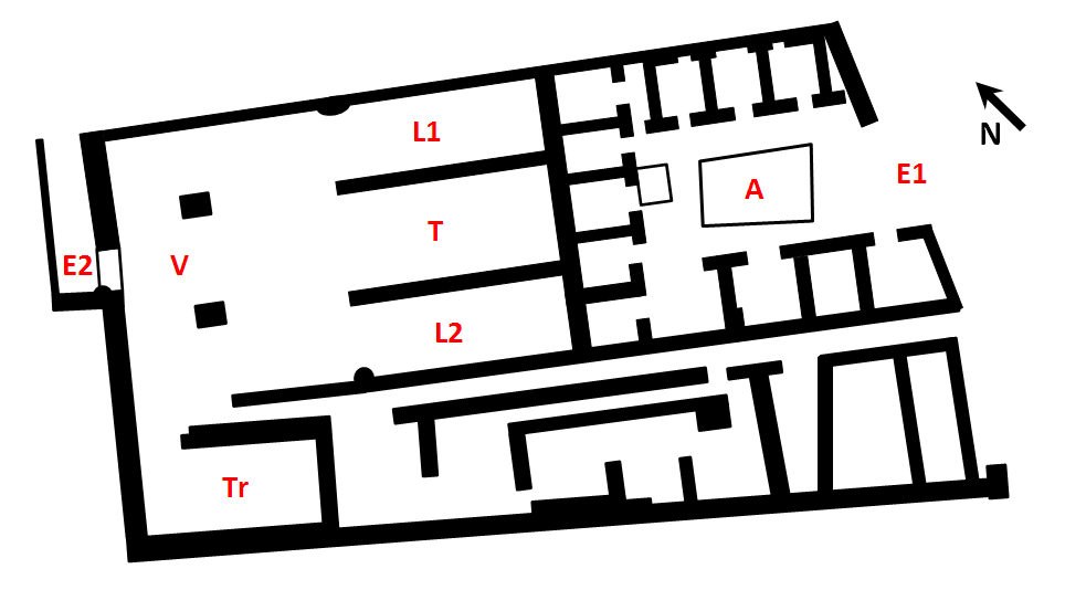 Plan de la maison de Livie (d'après panneau d'information sur le site).